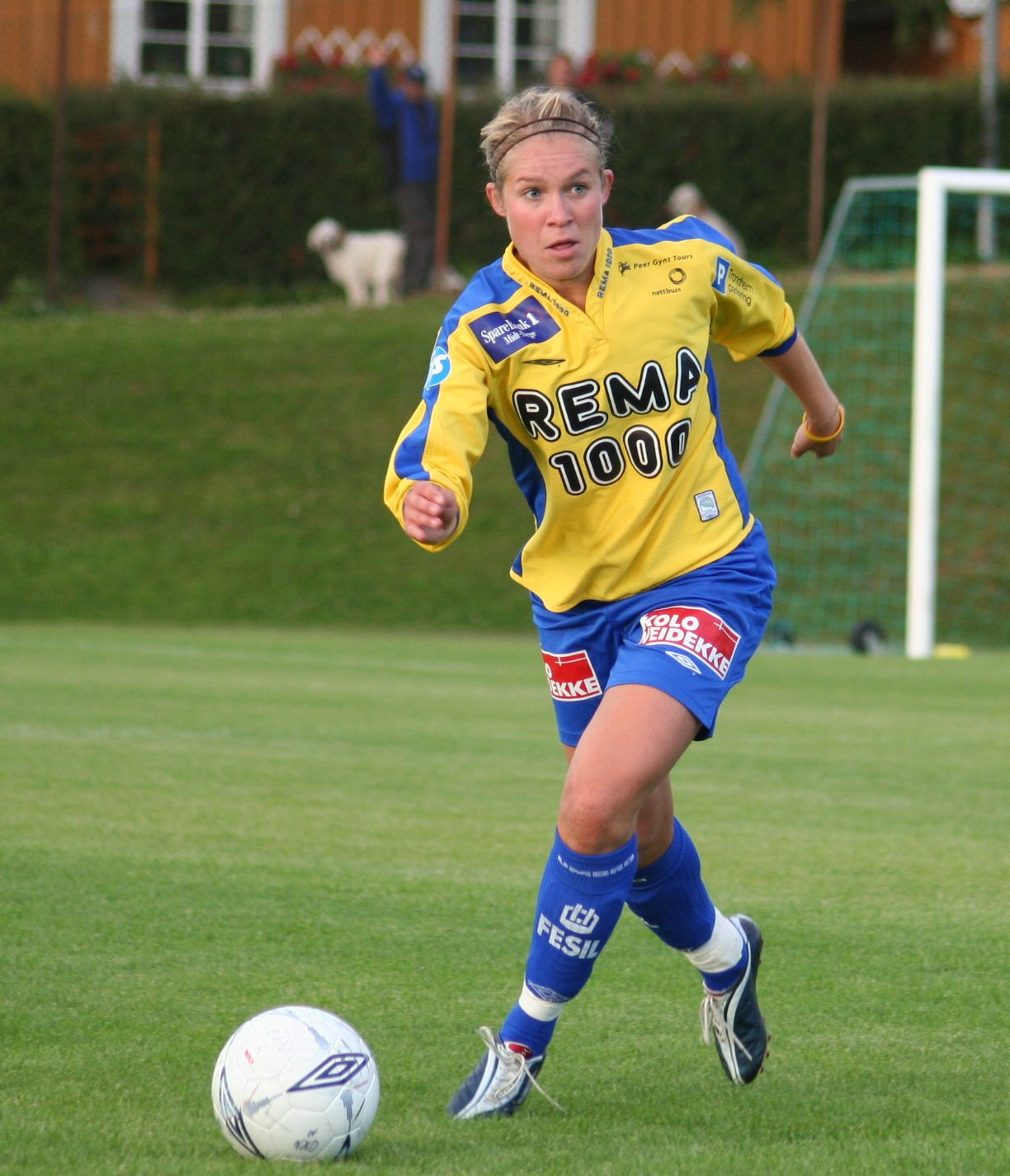 Fotballspilleren Marianne Paulsen